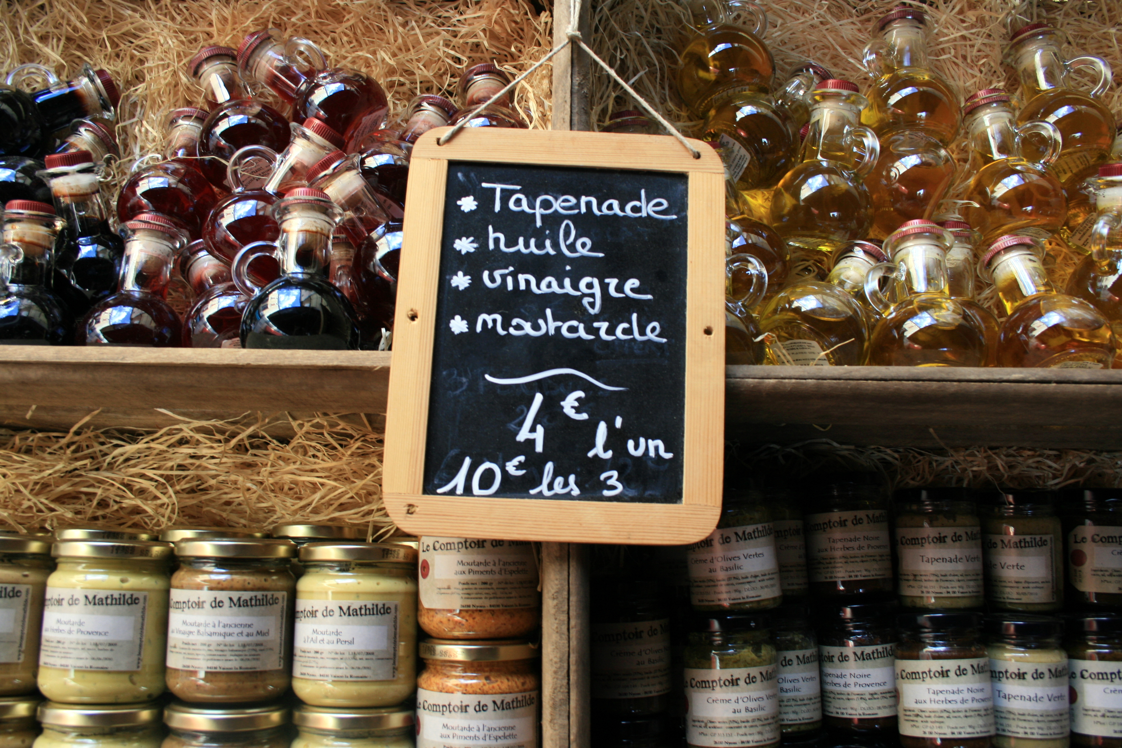 Produits du terroir à Vaison-la-Romaine